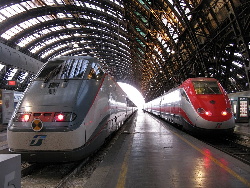 Gare de Milan Centrale